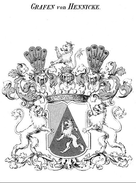 Wappen derer Grafen von Hennicke.